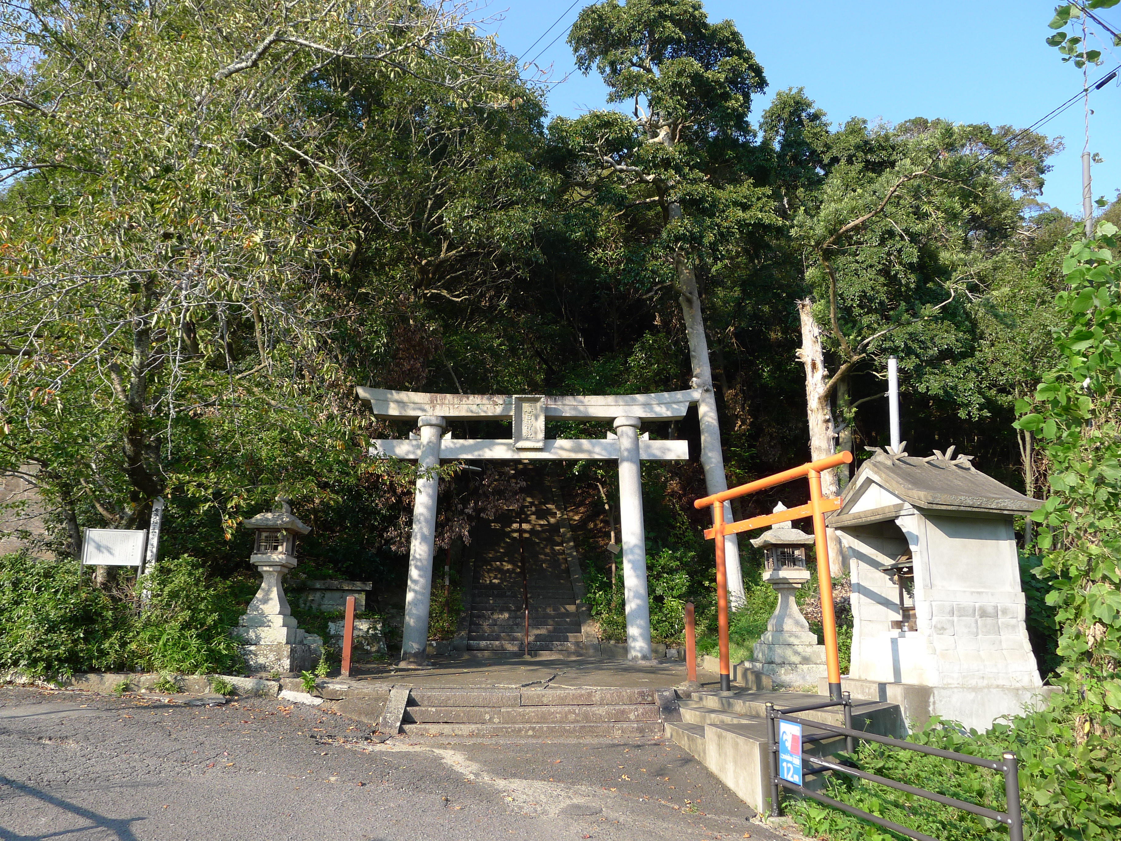 熊野古道・紀伊路の九十九王子の一つ松代王子を祀る春日神社（和歌山県海南市）